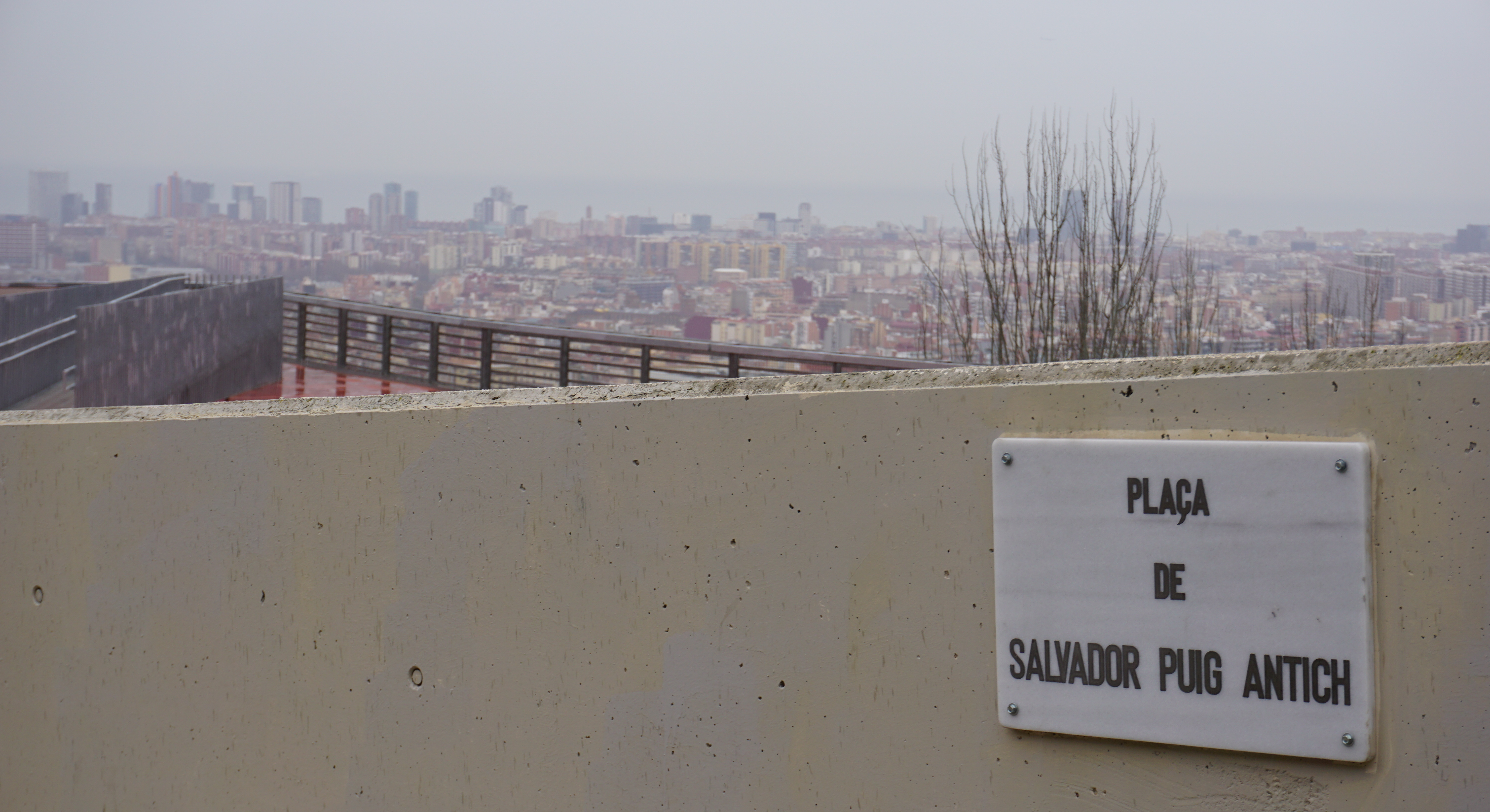 Plaza Salvador Puig Antich en Barcelona en memoria del militante anarquista inaugurada en 2016